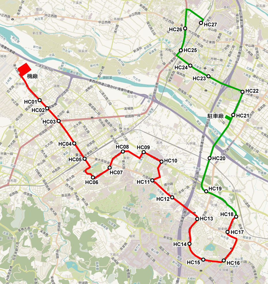 中文（台灣）: 新竹地區輕軌系統建設及周邊土地開發計畫可行性研究期中報告內的路線